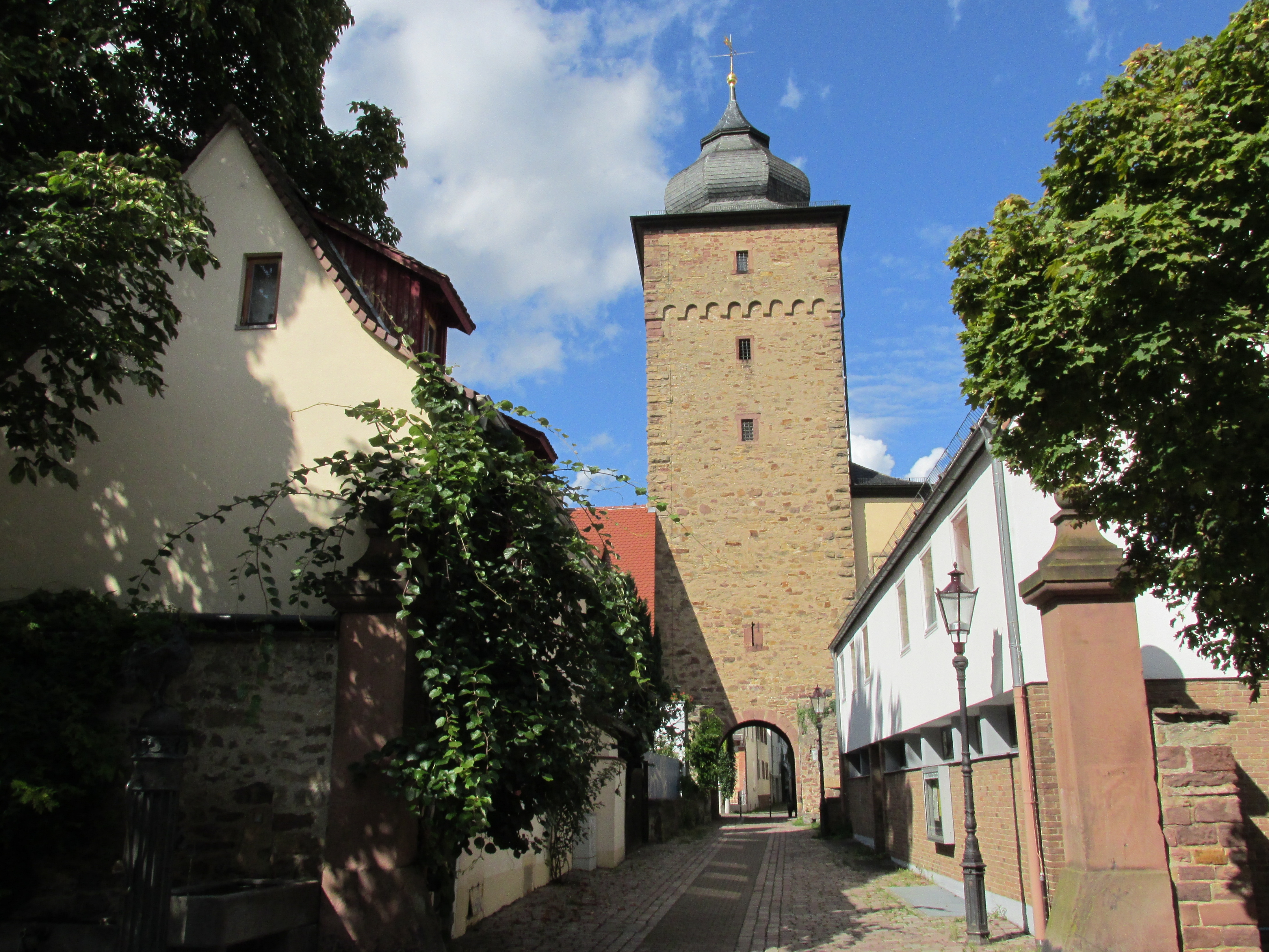 Karlsruhe - Durlach - Basler - Tor - Straße